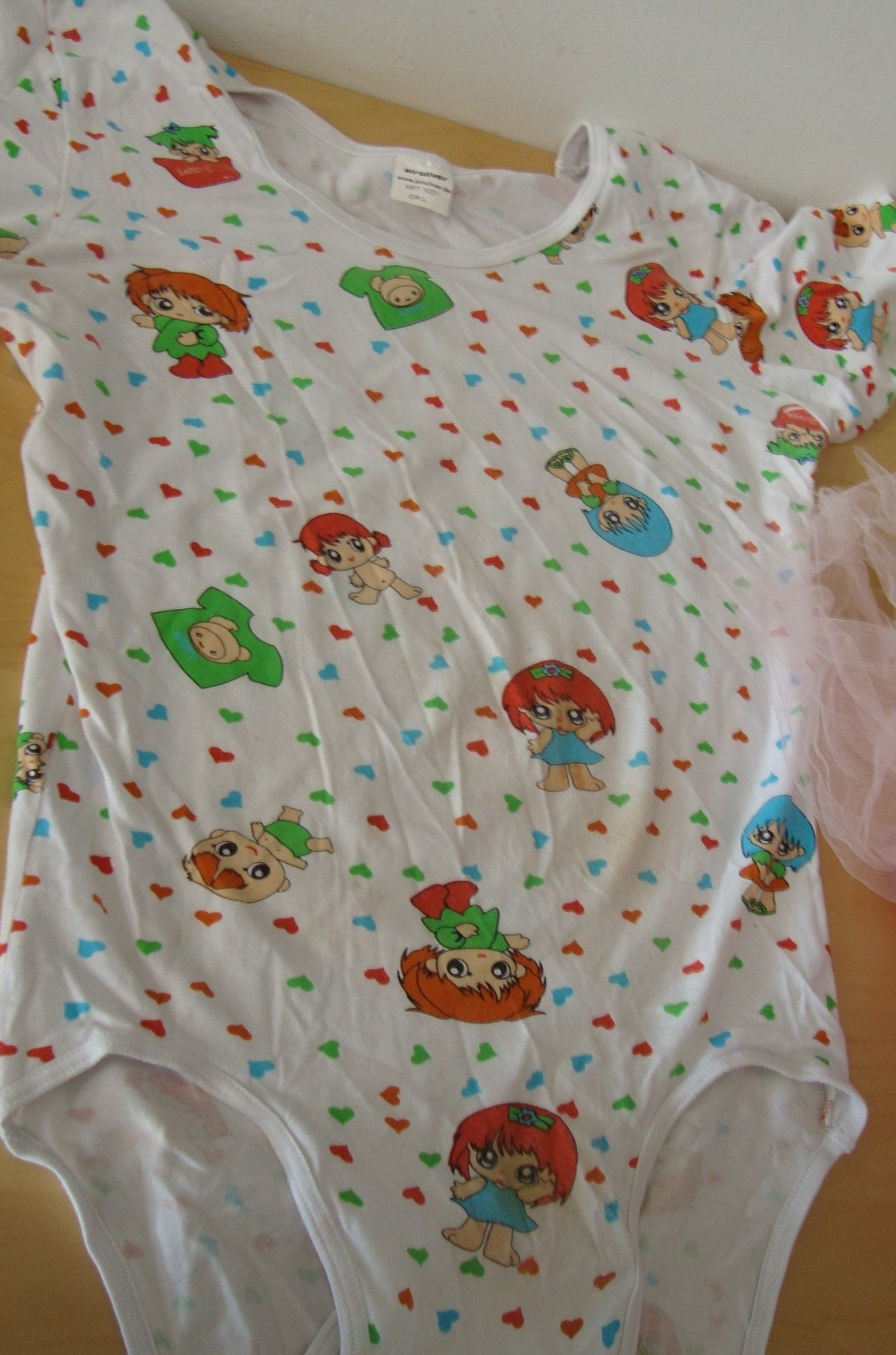 Infantiliste romper